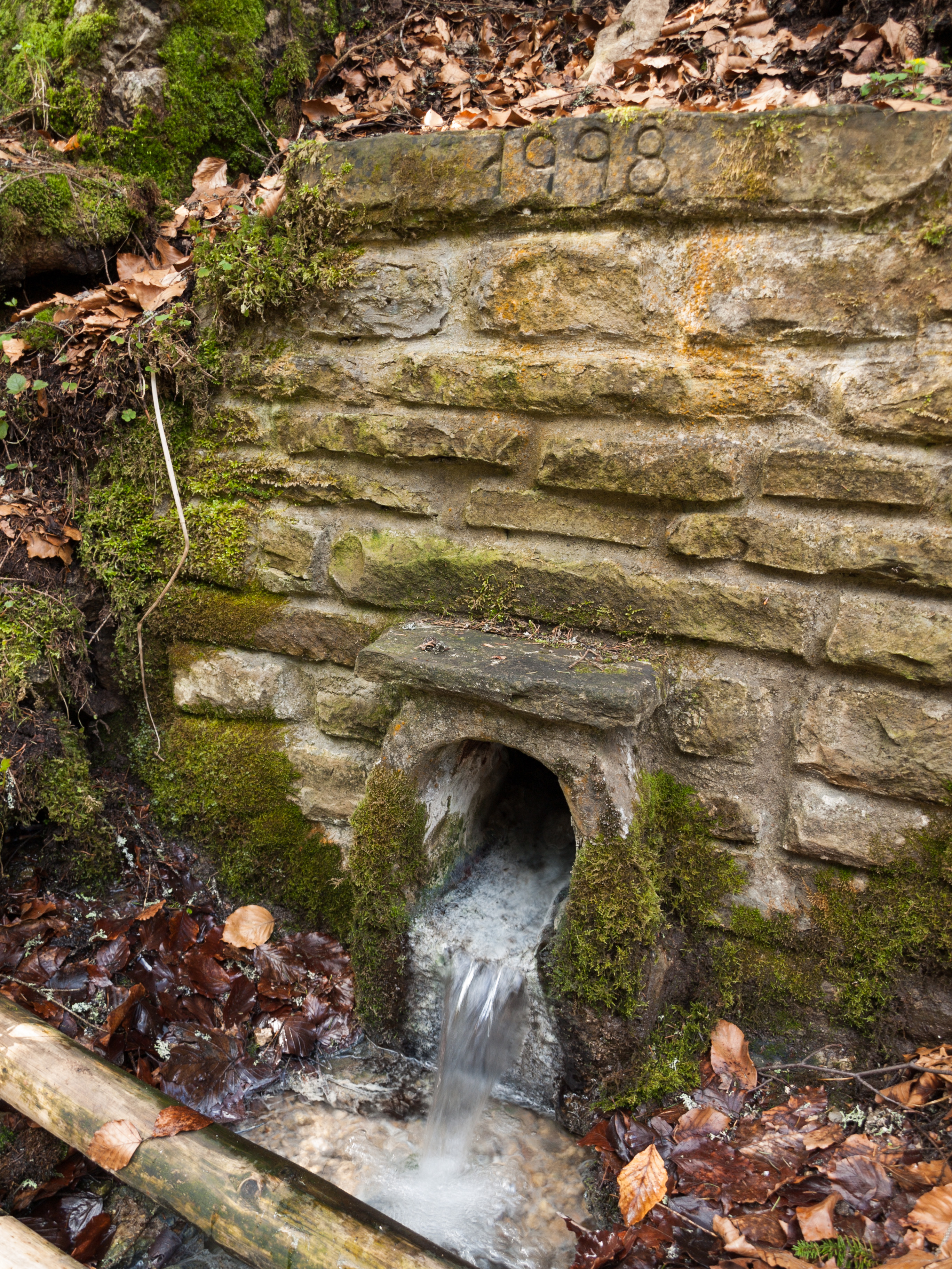 Kisła Woda